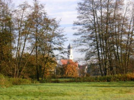 Kirche St. Adelgundis in Diedorf-Anhausen